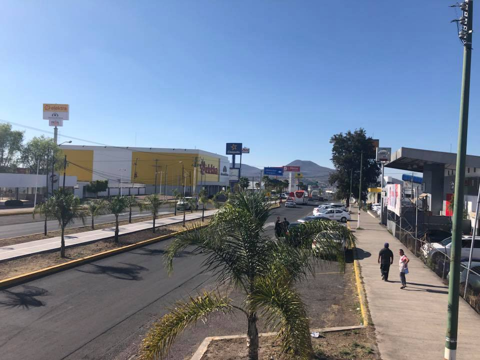 Centro Comercial Galerías Metropolitana Uriangato